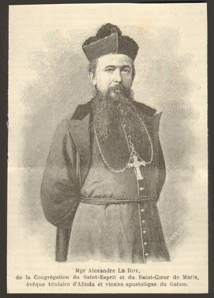 Mgr Le Roy, vicaire apostolique du Gabon.